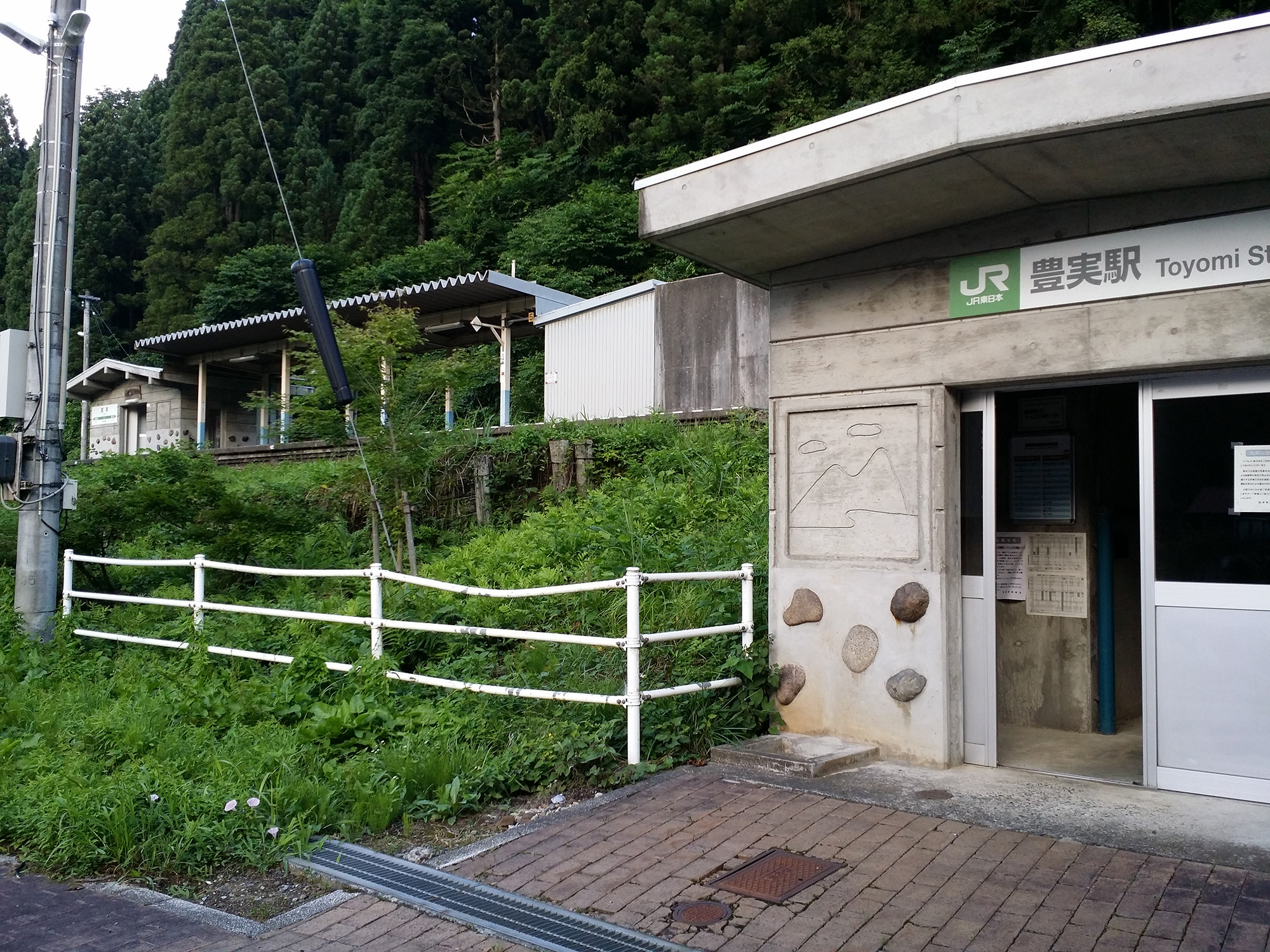 豊実駅入口